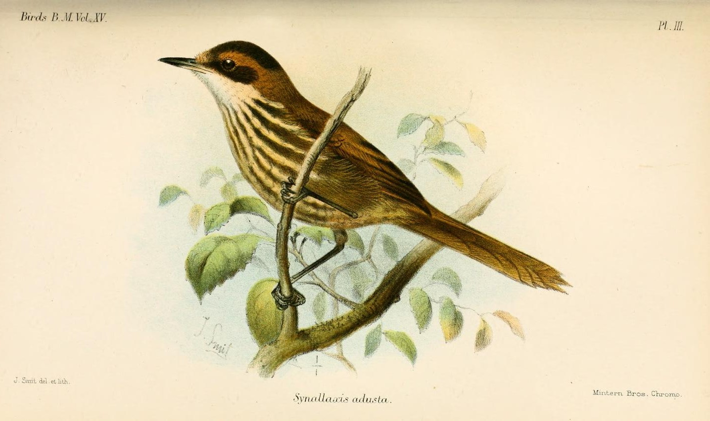 Synallaxis adusta = Roraimia adusta, Roraiman Barbtail